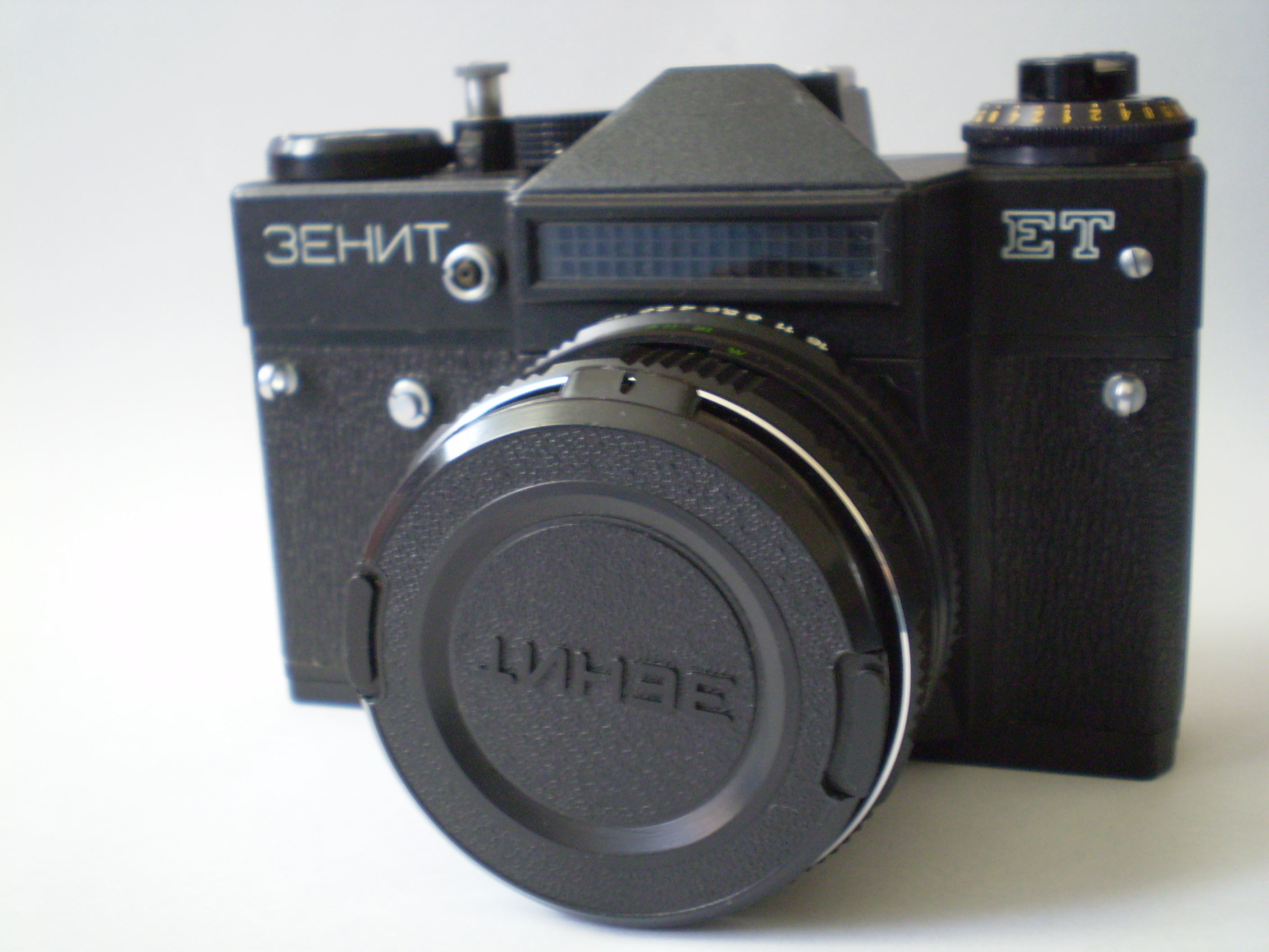 Фотоаппарат Зенит-ЕТ